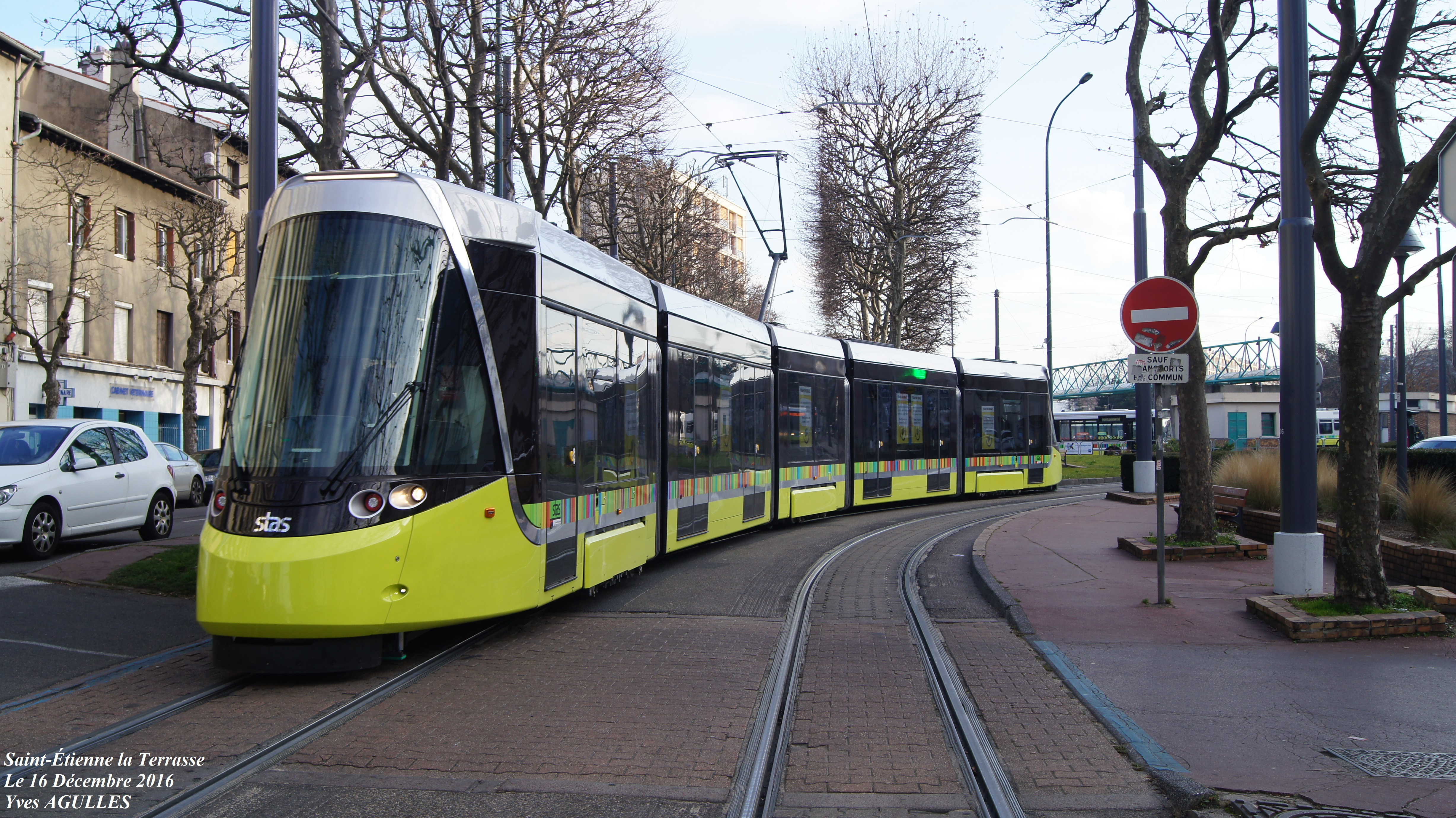 Saint-Étienne la terrasse CAF urbos